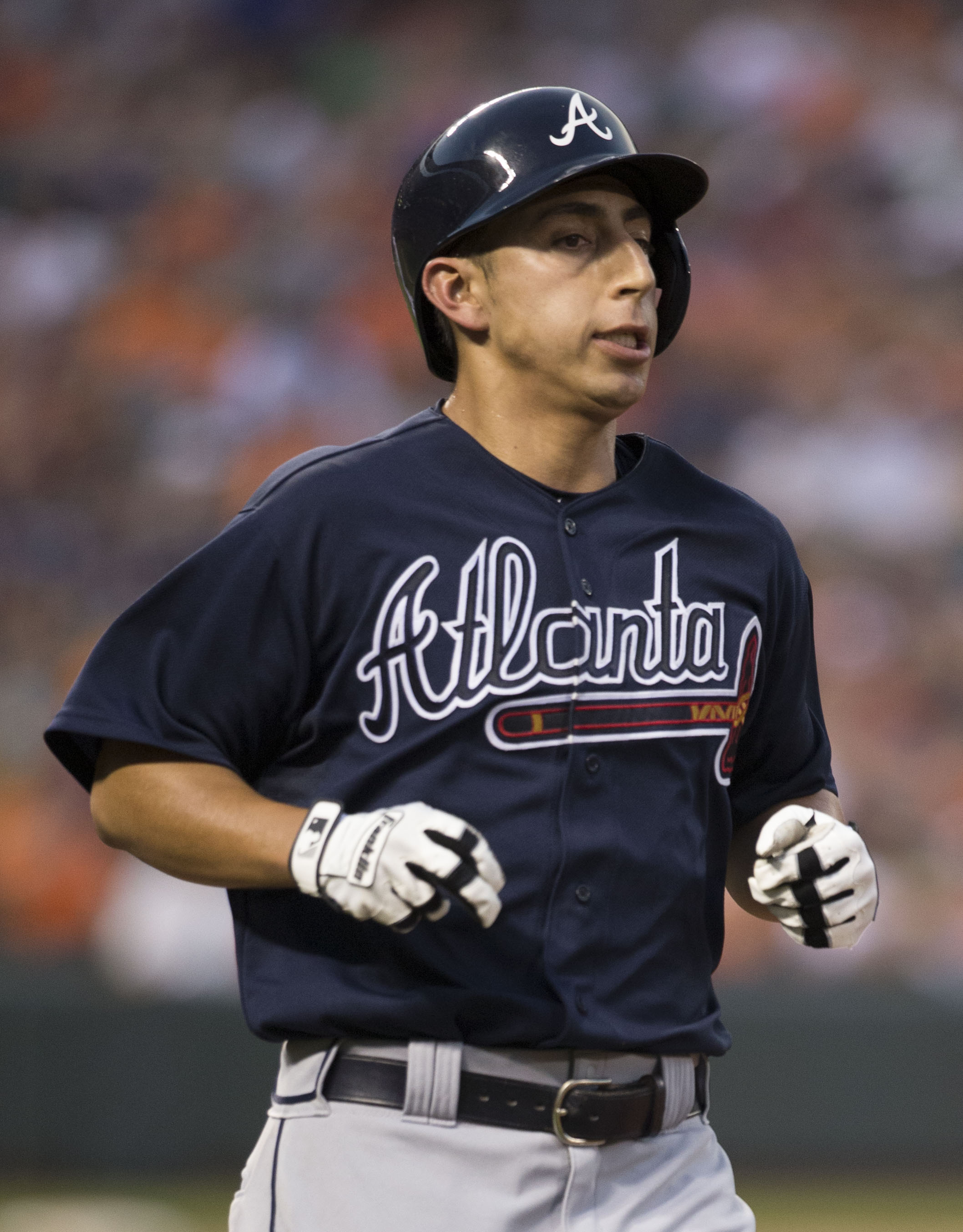 Daniel Castro